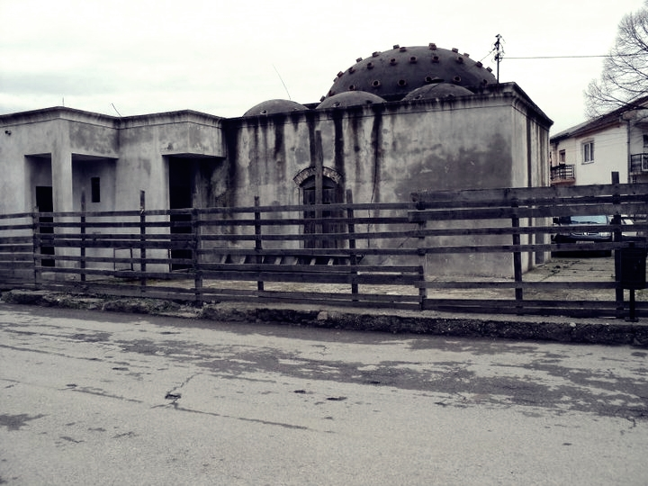 Гевгелија, Македонија